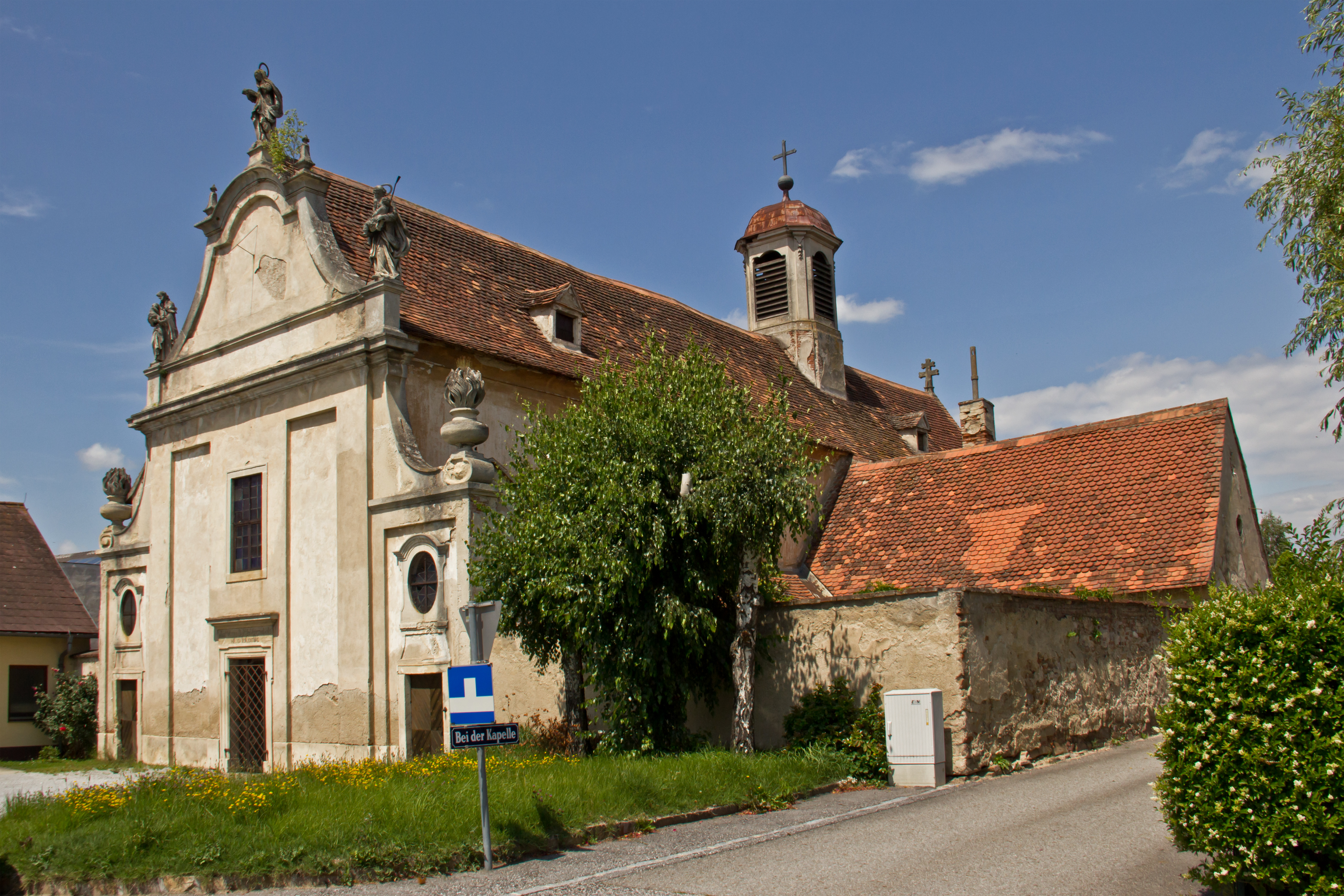 Die gräflich kufsteinische Gruftkapelle hl. Anna, eine ehemalige Spitalskirche, ist eine nach Norden ausgerichtete, barocke Anlage mit südlicher Hauptfassade.